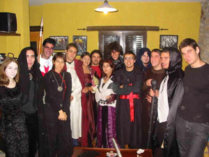 La imagen es de cámara propia.